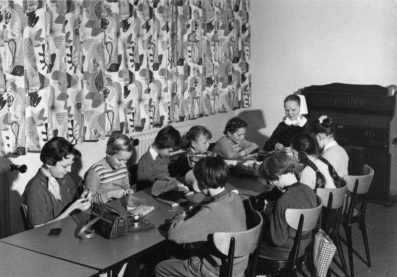 Ev. Bethlehem Gemeinde, Jugendheim Frankfurt/Main-Ginneim, Woogstr. 22